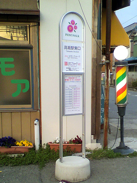 平成22年(2010年)3月17日午後16時30分頃、ハタ坊本人が高坂駅東口にて撮影。